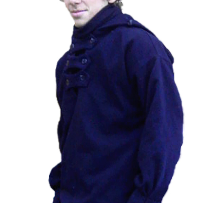 Jungenschaftsbluse